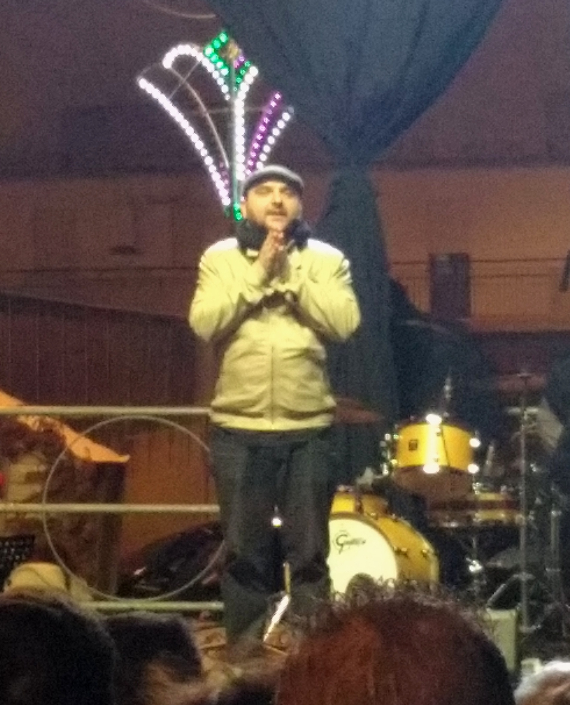 Pandolfo, cabarettista di Alcamo, durante un suo spettacolo